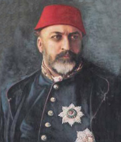 Sultan Abdül Aziz I